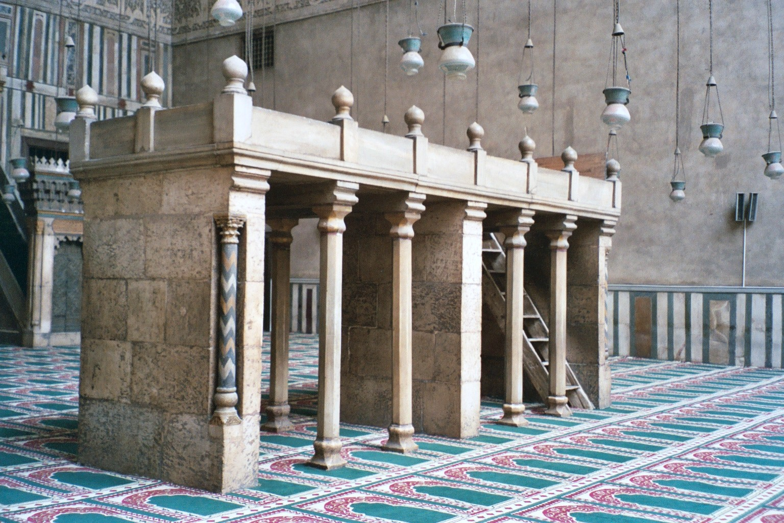 Tribune (dikka) de la mosquée Sultan Hasan